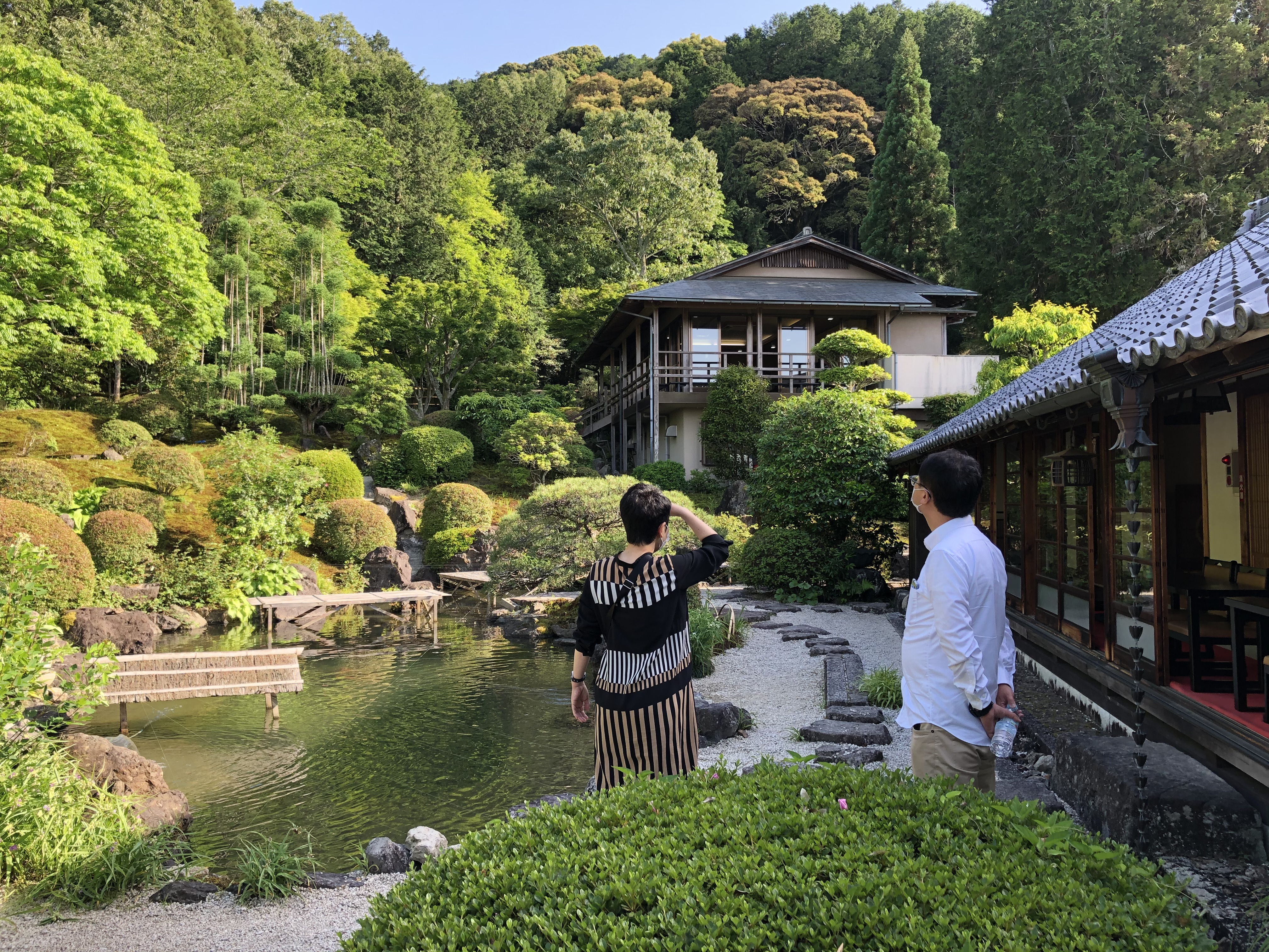 奥殿陣屋（岡崎市奥殿町）